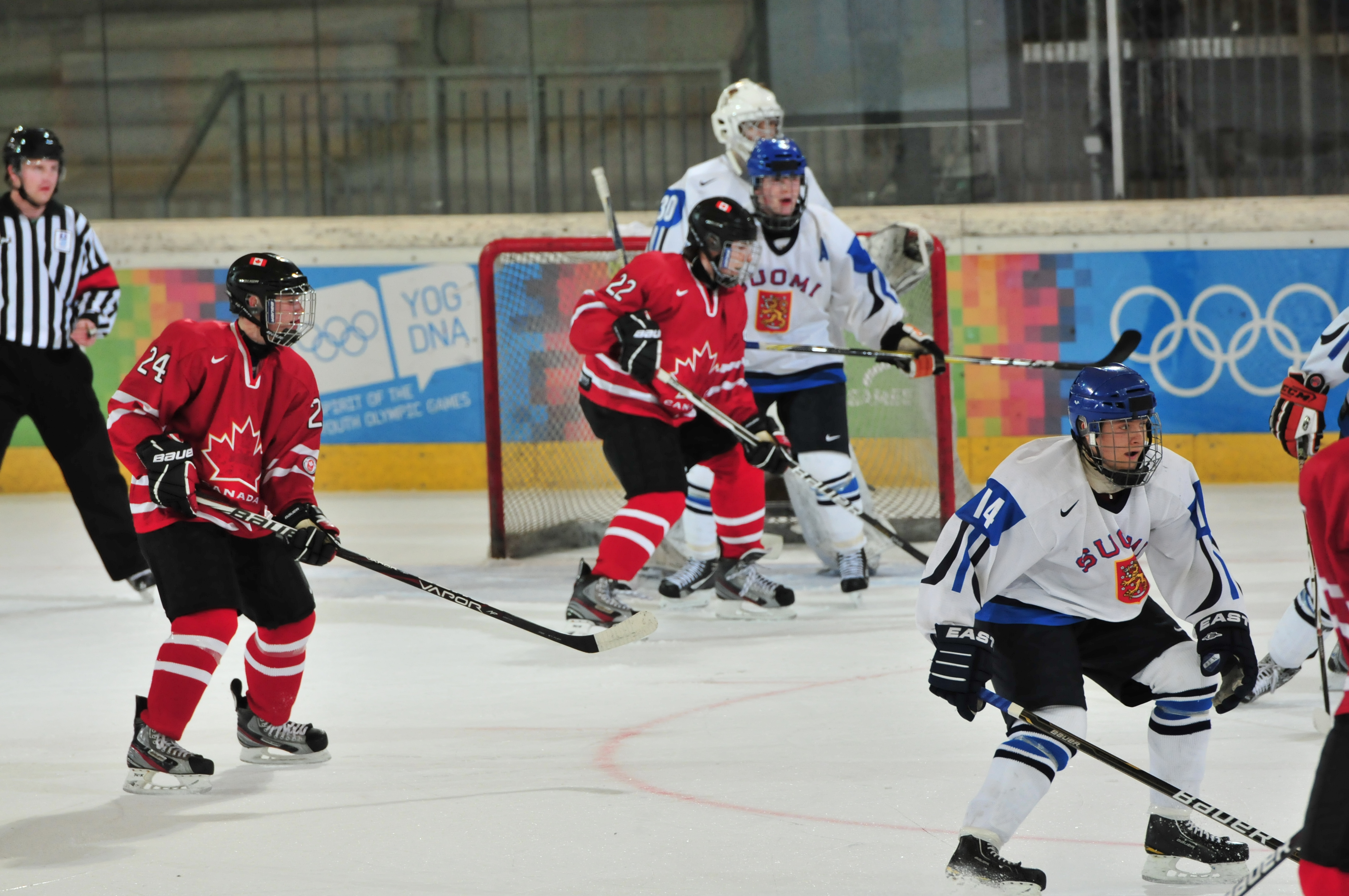 1. Jugendolympiade 2012 Innsbruck